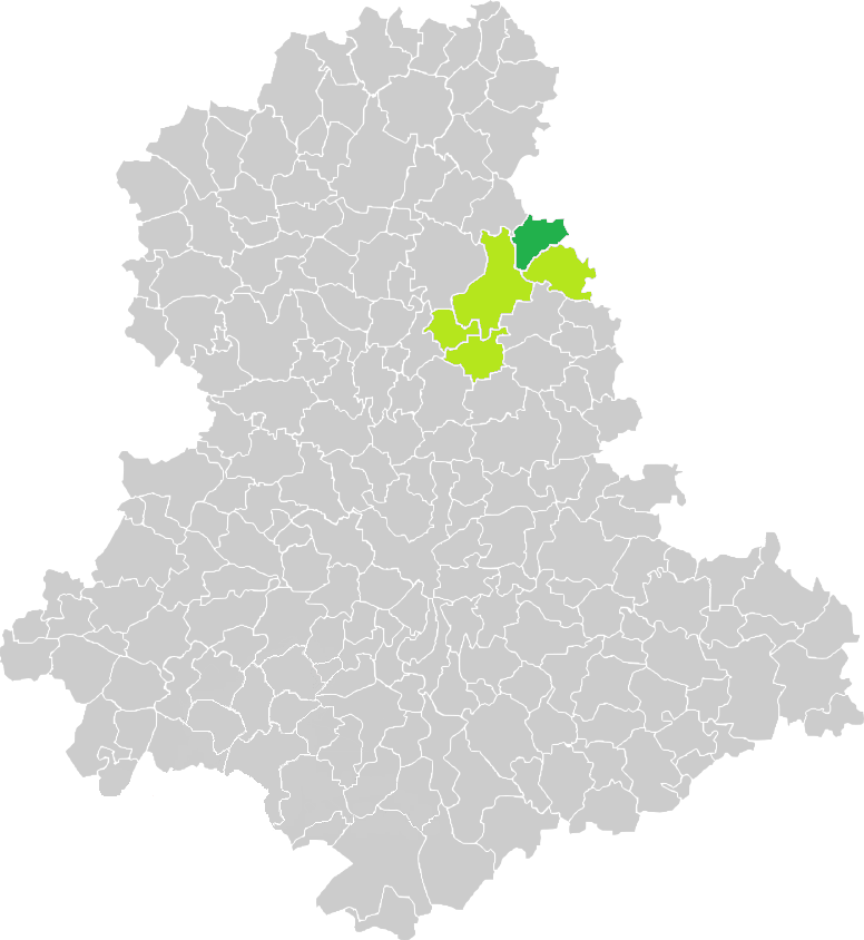 Carte de situation de la commune de Fromental (en vert foncé) dans le votre Canton (en vert clair) sur une carte des communes de la Haute-Vienne